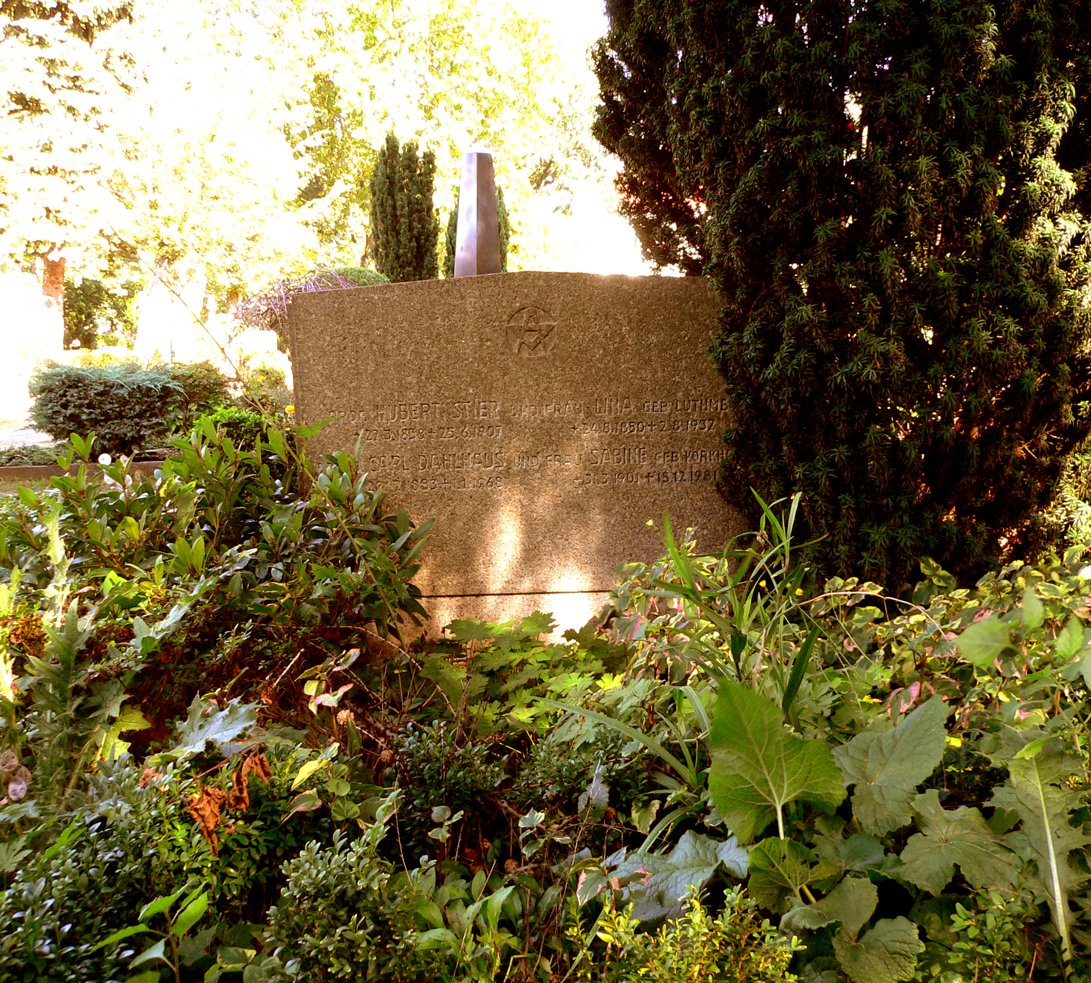 Grabmal Professor Hubert Stier auf dem Neuen St. Nikolai Friedhof im hannoverschen Stadtteil Nordstadt